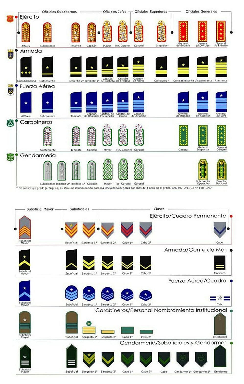 Grados jerárquicos del Ejército de Chile, la Armada de Chile, la Fuerza Aérea de Chile, la Gendarmería de Chile y Carabineros de Chile.